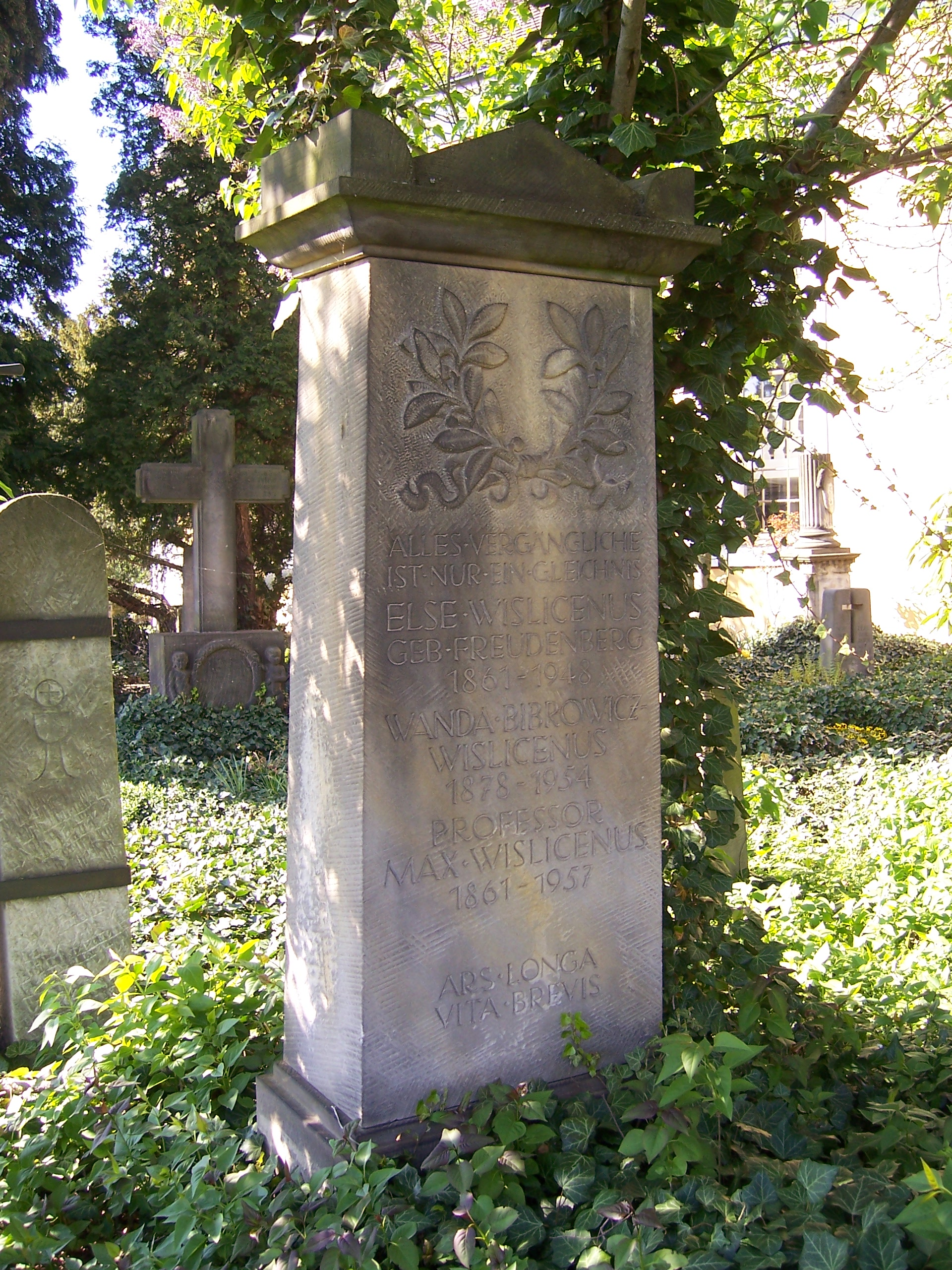 Grab von Wanda Bibrowicz (1878-1954) und Max Wislicenus (1861-1957) auf dem Kirchhof Maria am Wasser in Dresden-Hosterwitz. Ars Longa. Vita brevis